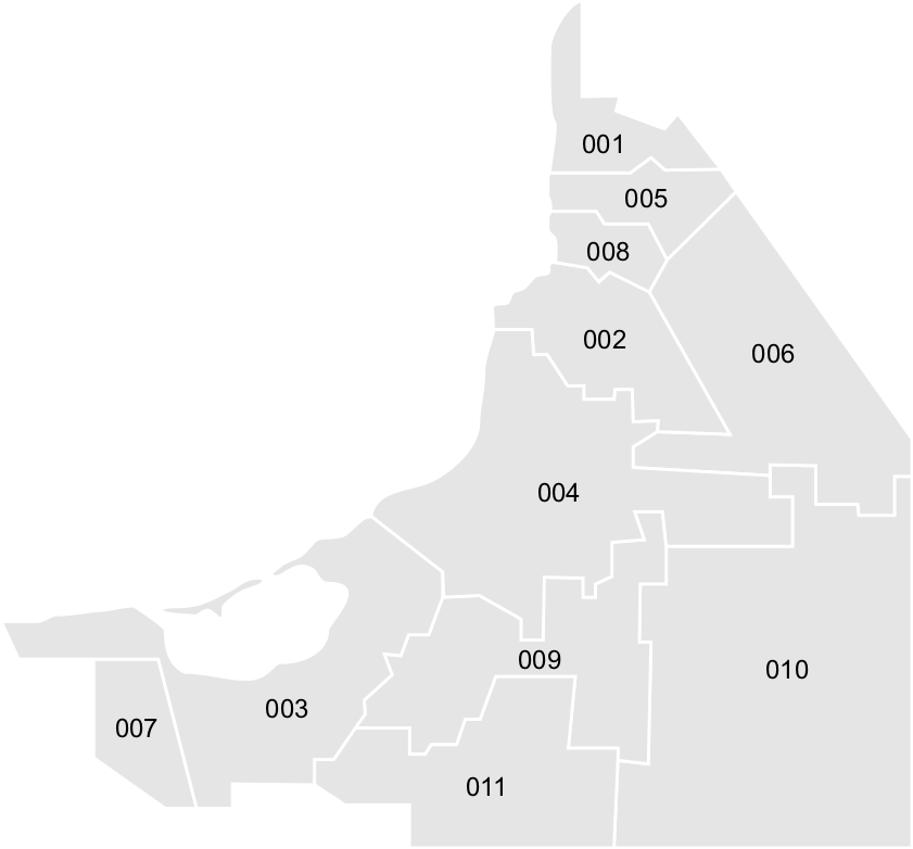 Mapa de los municipios del Estado de Campeche, Mexico.